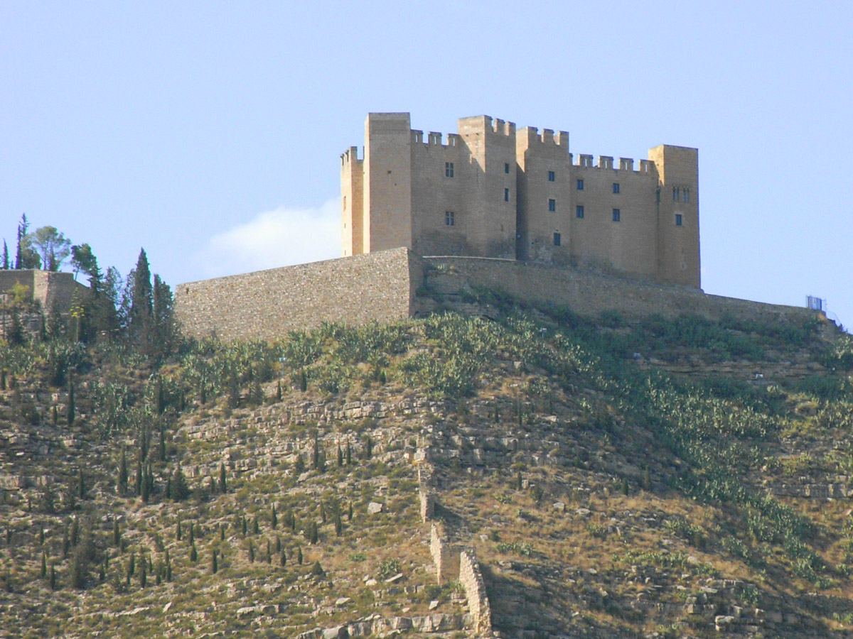 Castell de Mequinensa (Baix Cinca)